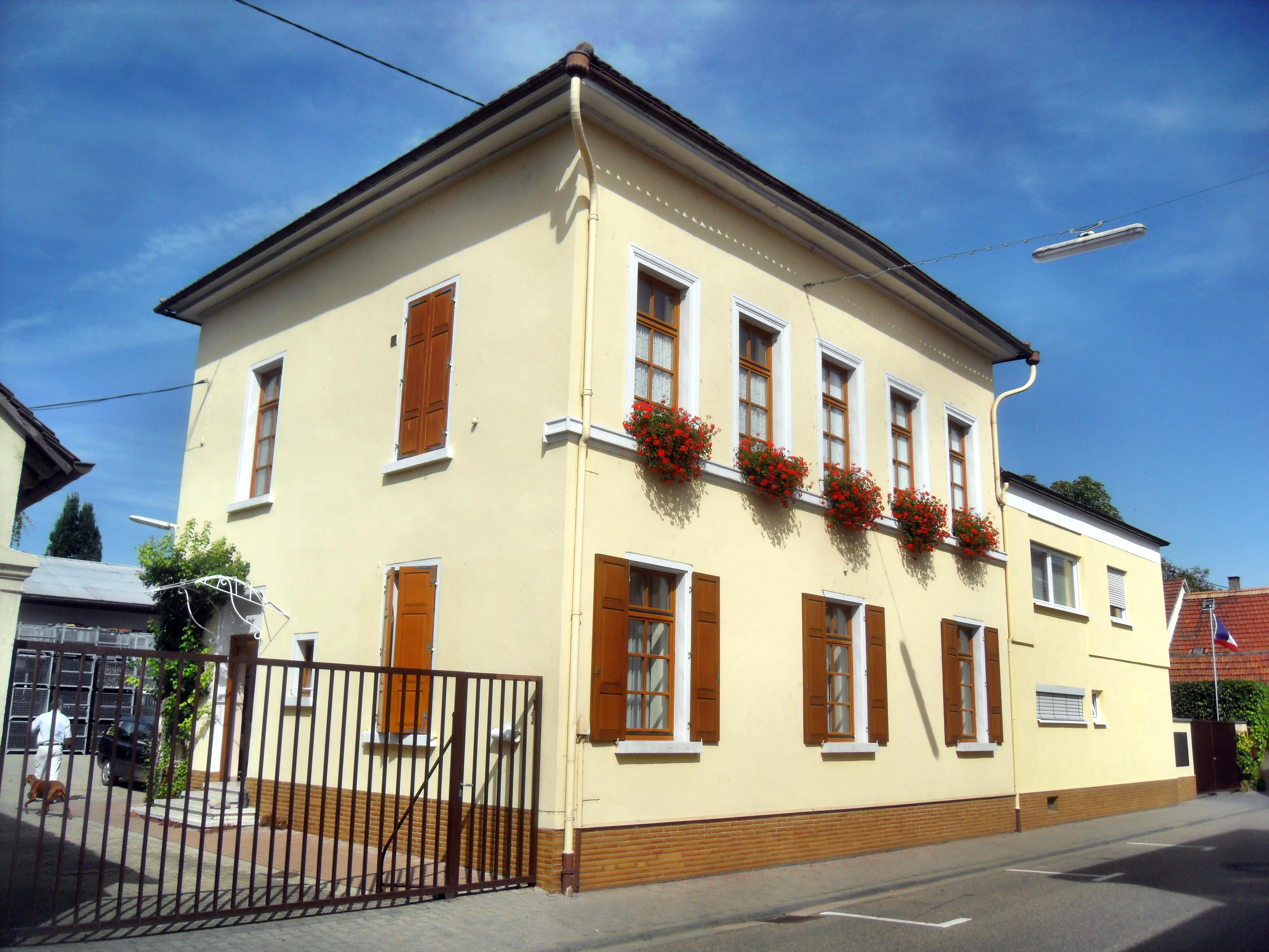 Die Südfassade des Weingutes Rappenhof in Alsheim (Deutschland), von der Bachstraße aus